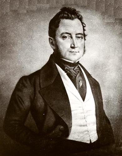 Édouard-Raymond Fabre est né le 15 septembre 1799 à Montréal. Premier véritable libraire, homme politique et patriote, il a été maire de Montréal de 1849 à 1851. Il décède du choléra le 16 juillet 1854 à Montréal.